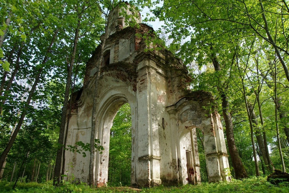 Сітцы. Сядзіба Дамейкаў